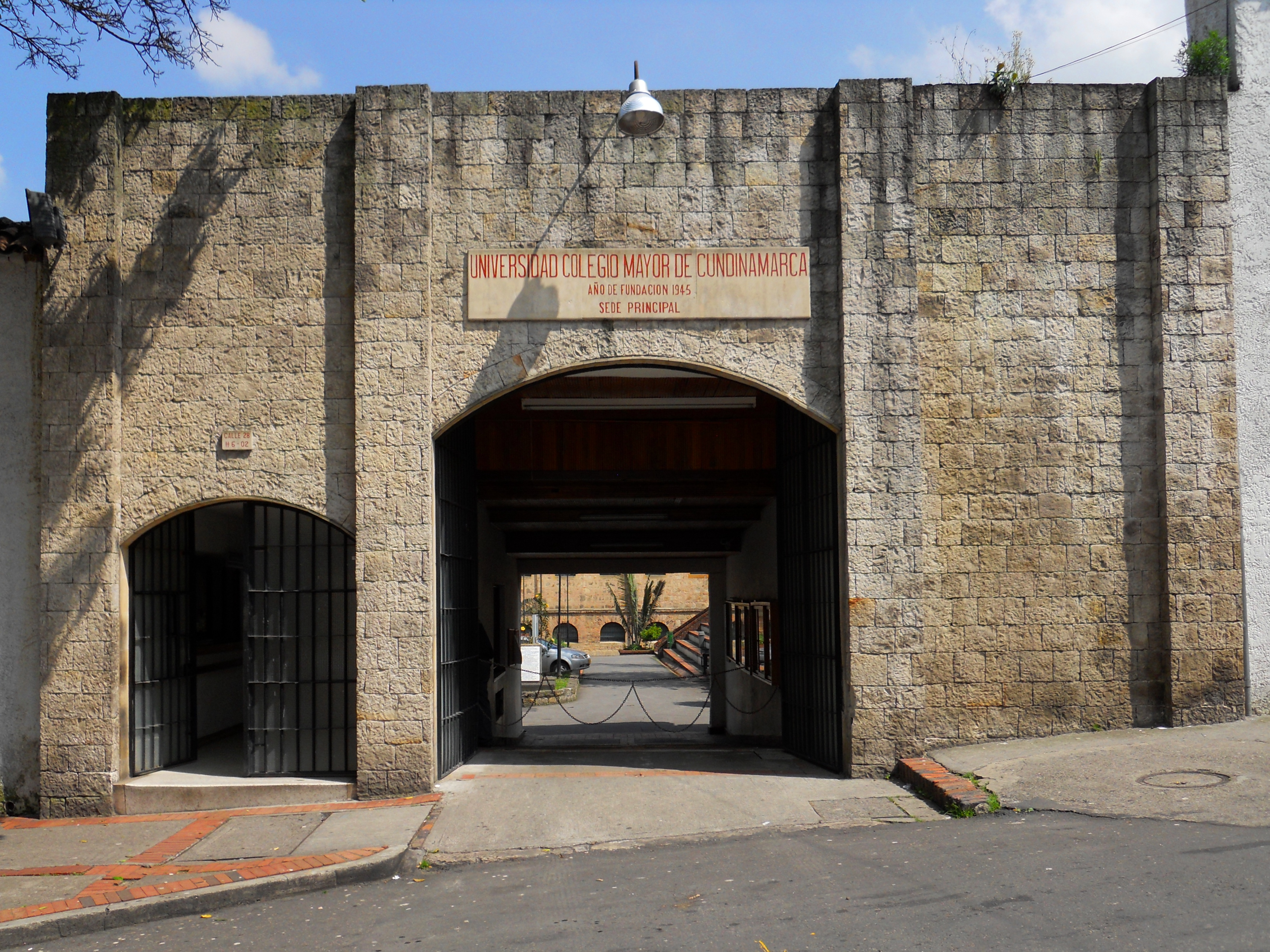 Universidad Colegio Mayor de Cundinamarca